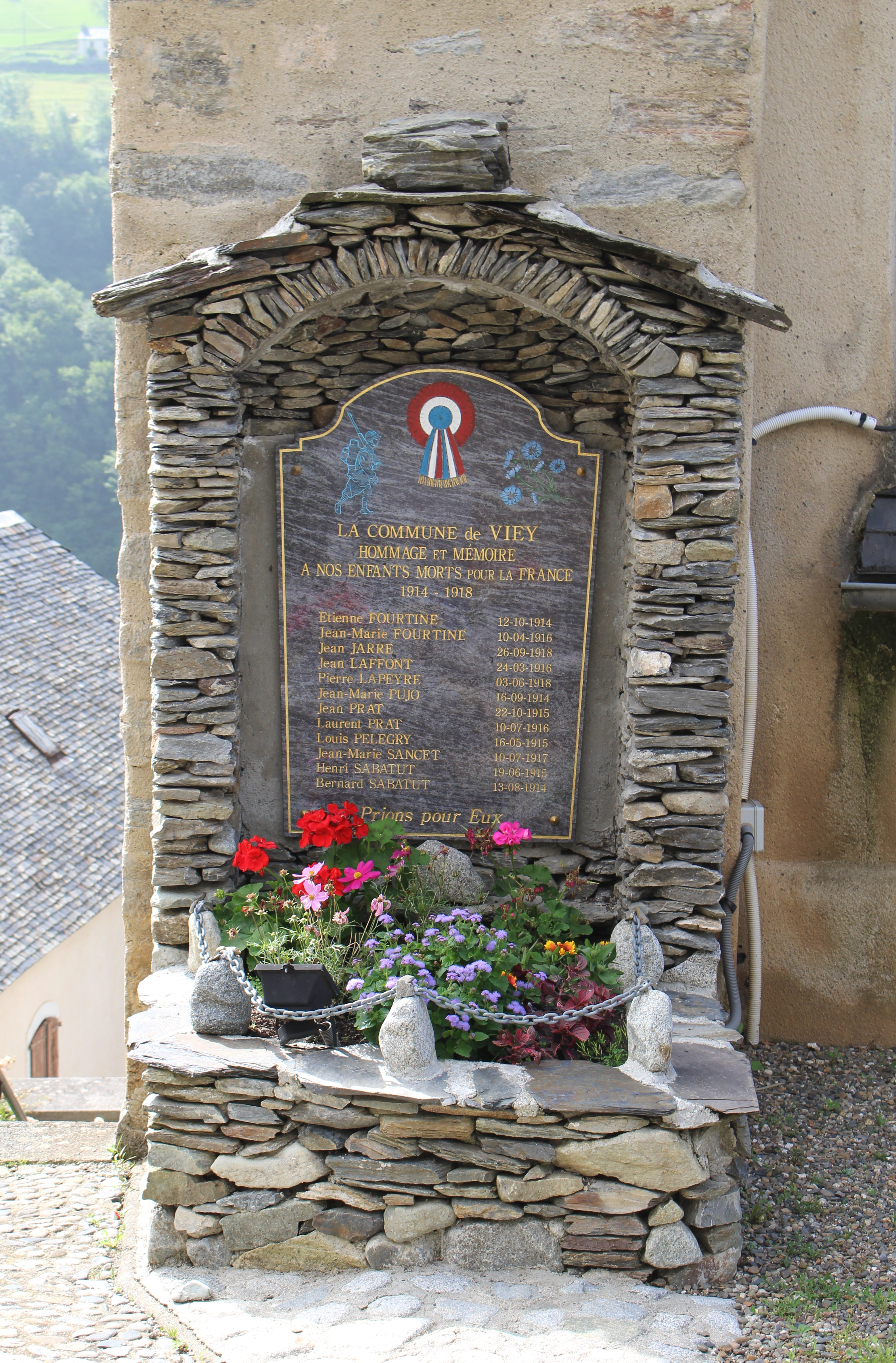 Monument aux morts de Viey (Hautes-Pyrénées)